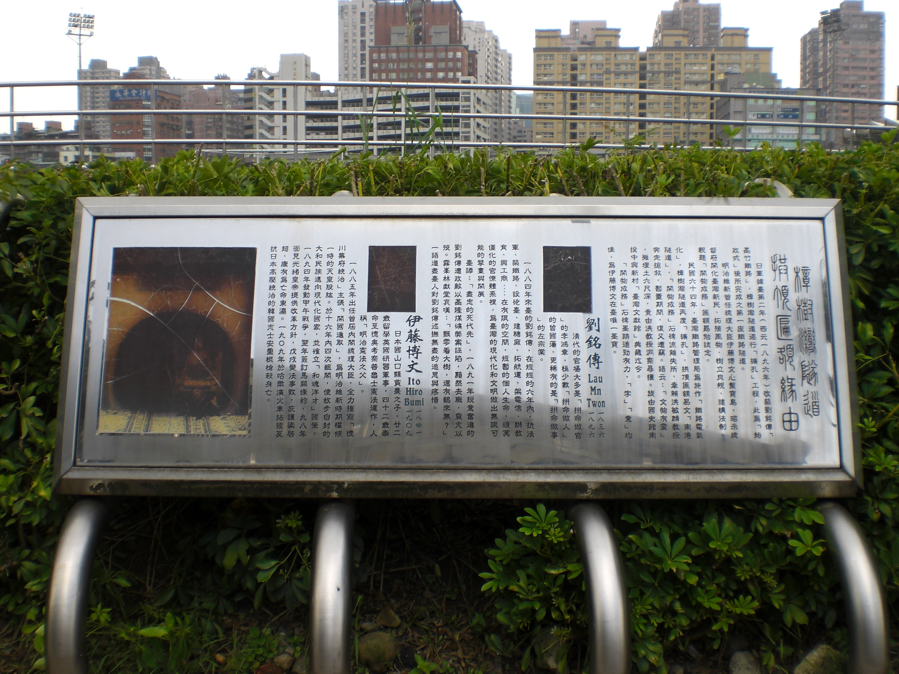 伊藤博文為樟樹灣隧道題字的「開物成務」石碑解說牌，現位於新北市汐止區秀峰路汐止區綜合運動場旁。